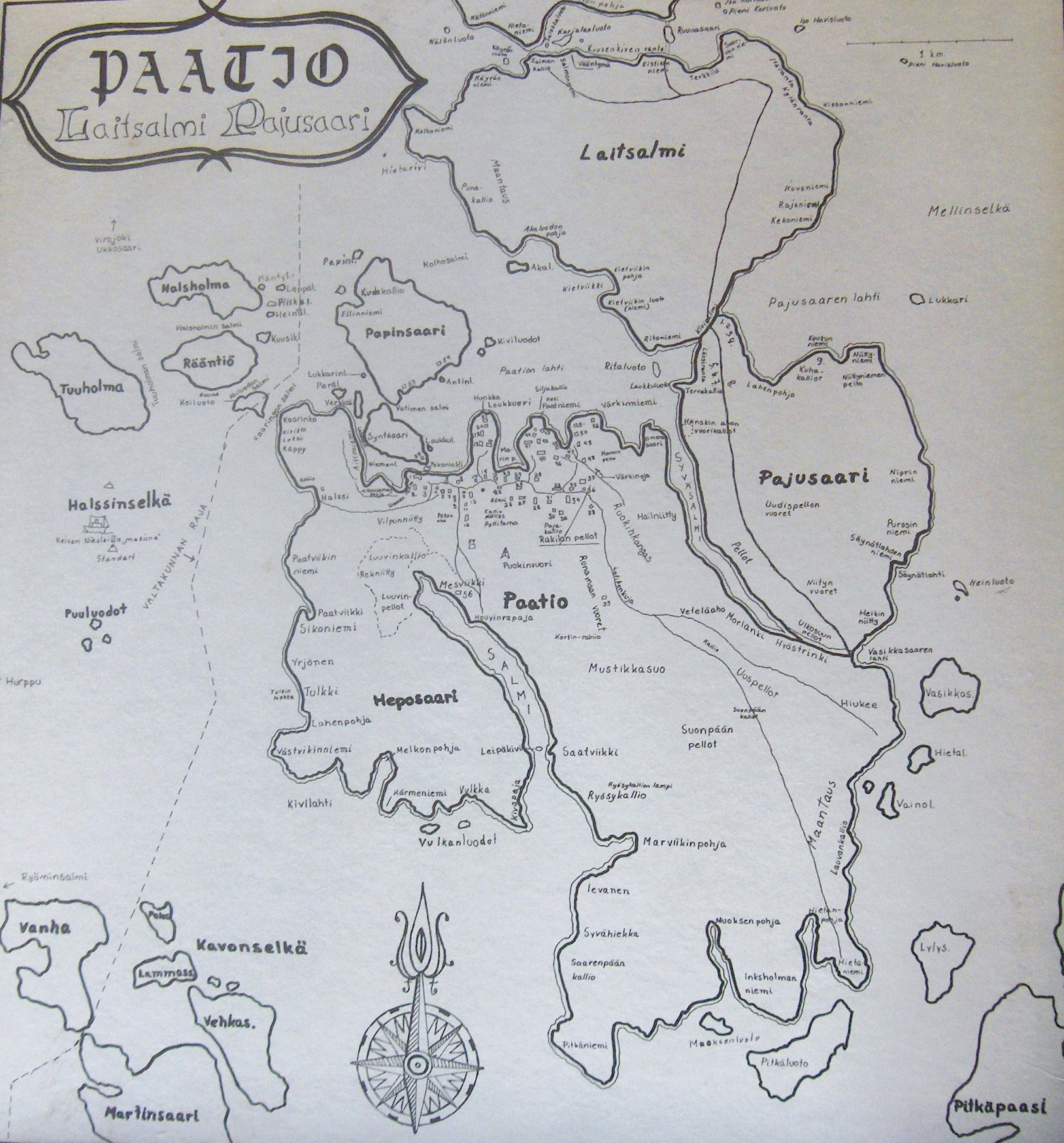 Kuva otettu piirretystä kartasta.